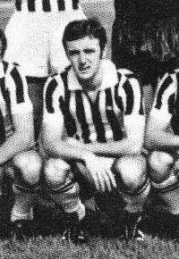 Il calciatore italiano Roberto Montorsi alla Juventus nella stagione 1970-71.